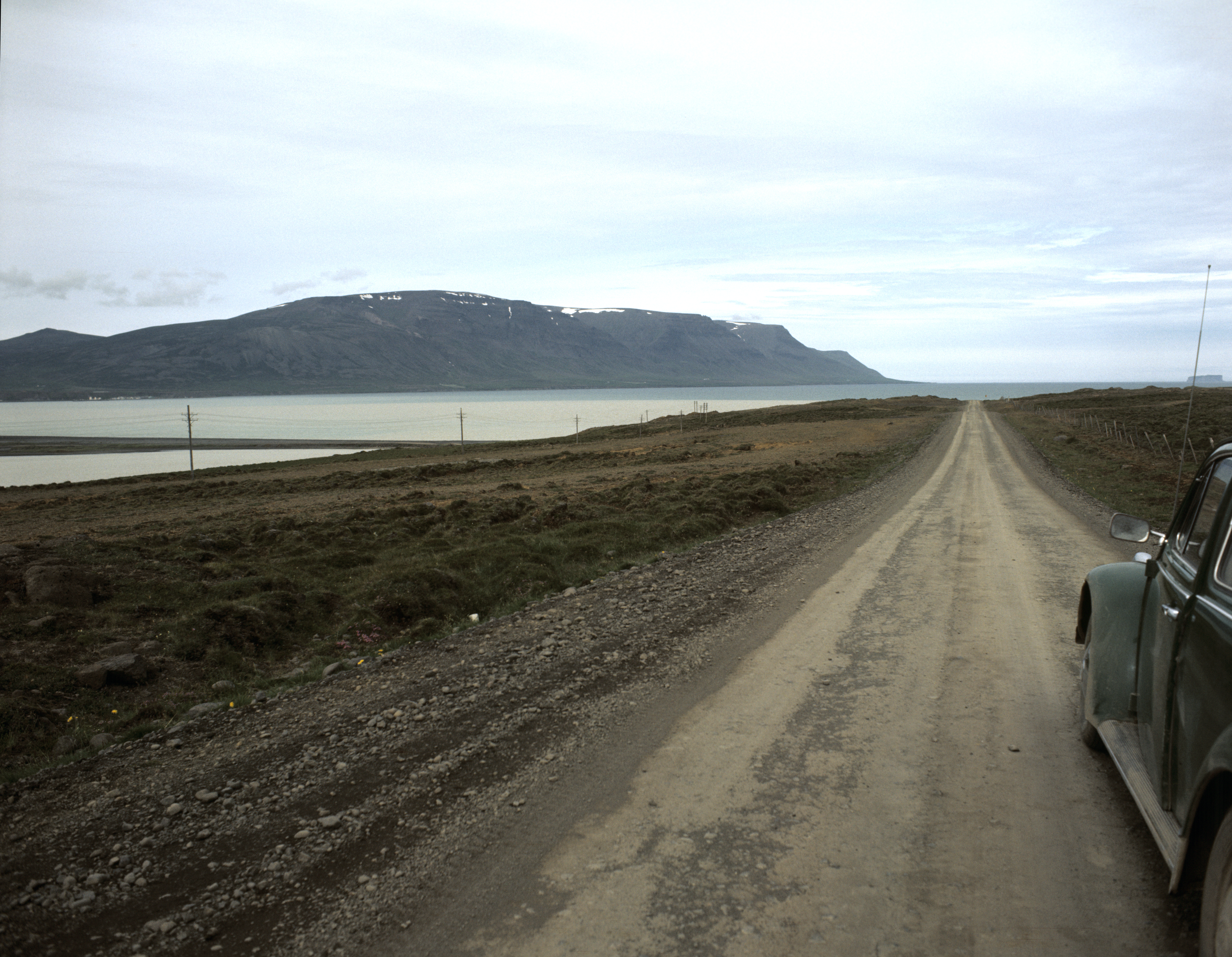 Straße nach Sauðakrókur am Ende des Skagafjörður. Am Horizont ganz rechts Drangey.